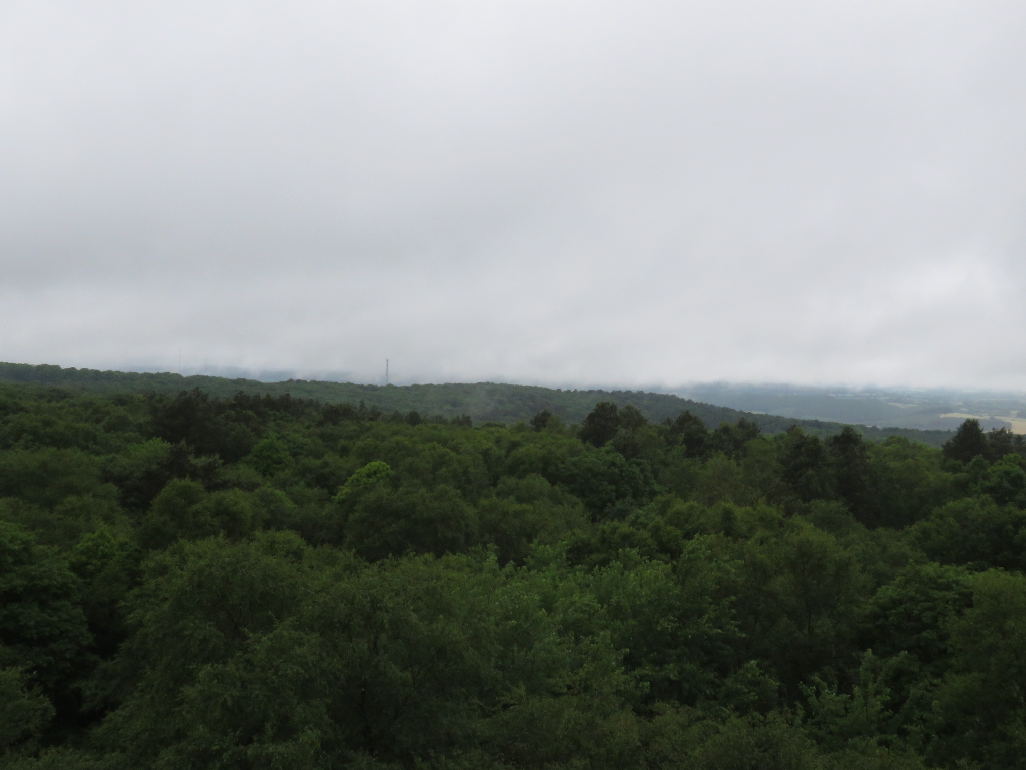 Vue du belvédère.